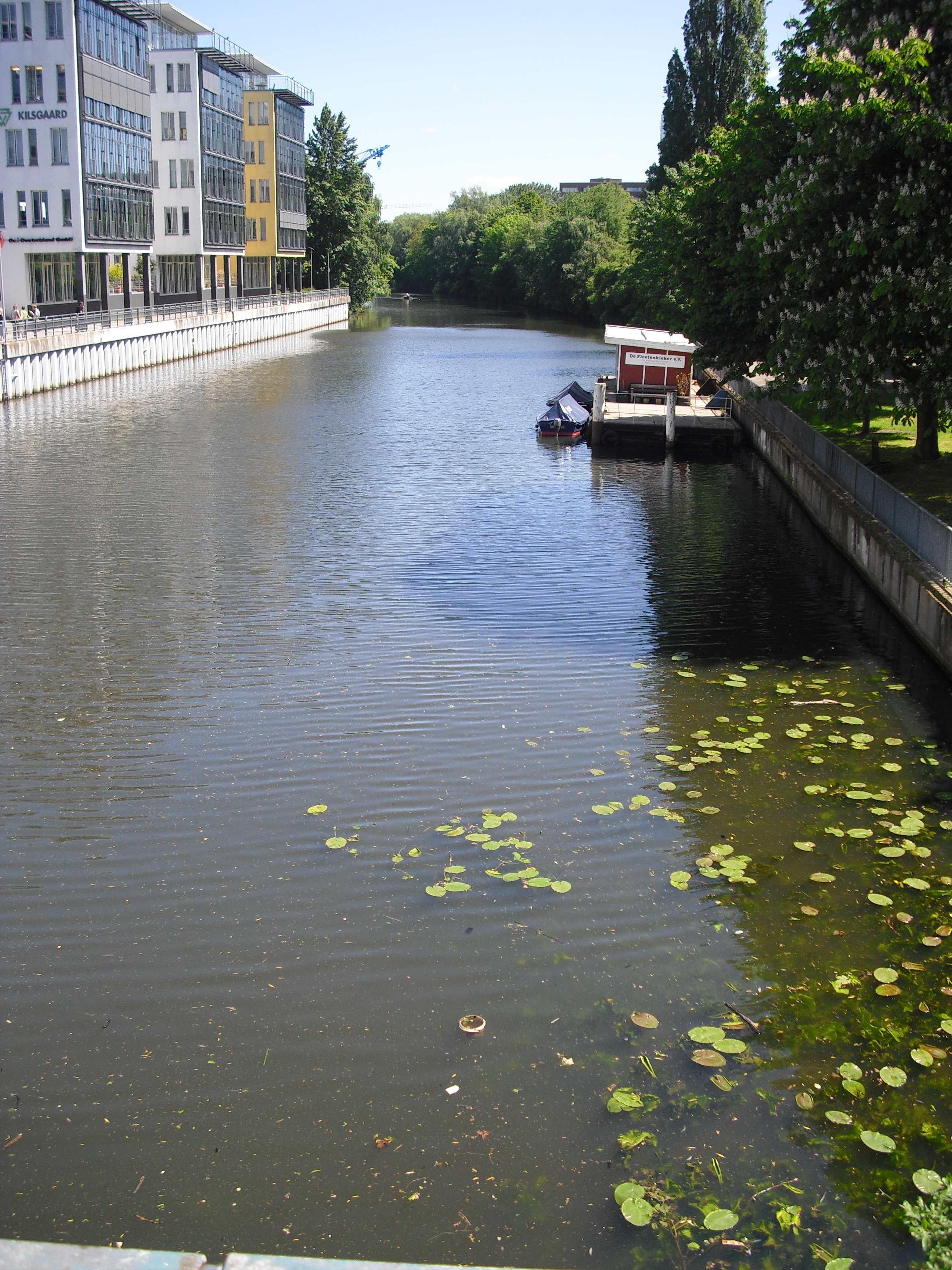 Osterbekkanal